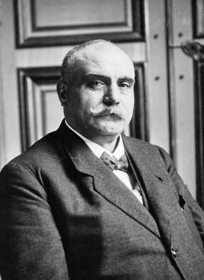 Mr Claveille, ministre des Travaux Publics : photographie de presse